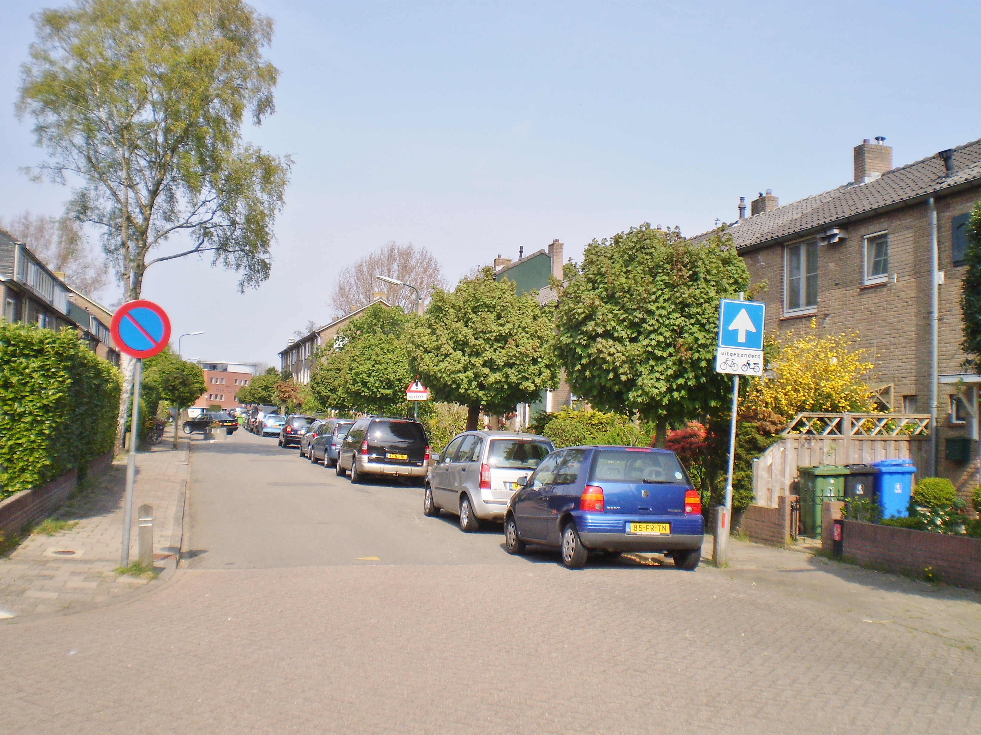 richting Drakenburgerweg